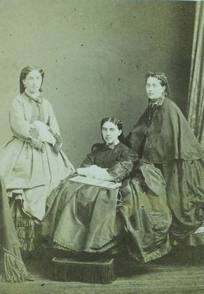 Дочери золотопромышленника, откупщика и филантропа И. Ф. Базилевского: Александра Ивановна Дубельт, баронесса Наталья Ивановна Тетенборн (1829—1869; жена генерала Карла Тетенборна (1815—89) и Елизавета Ивановна Кушелева-Безбородко (1839— ?; в третьем браке Суворова).